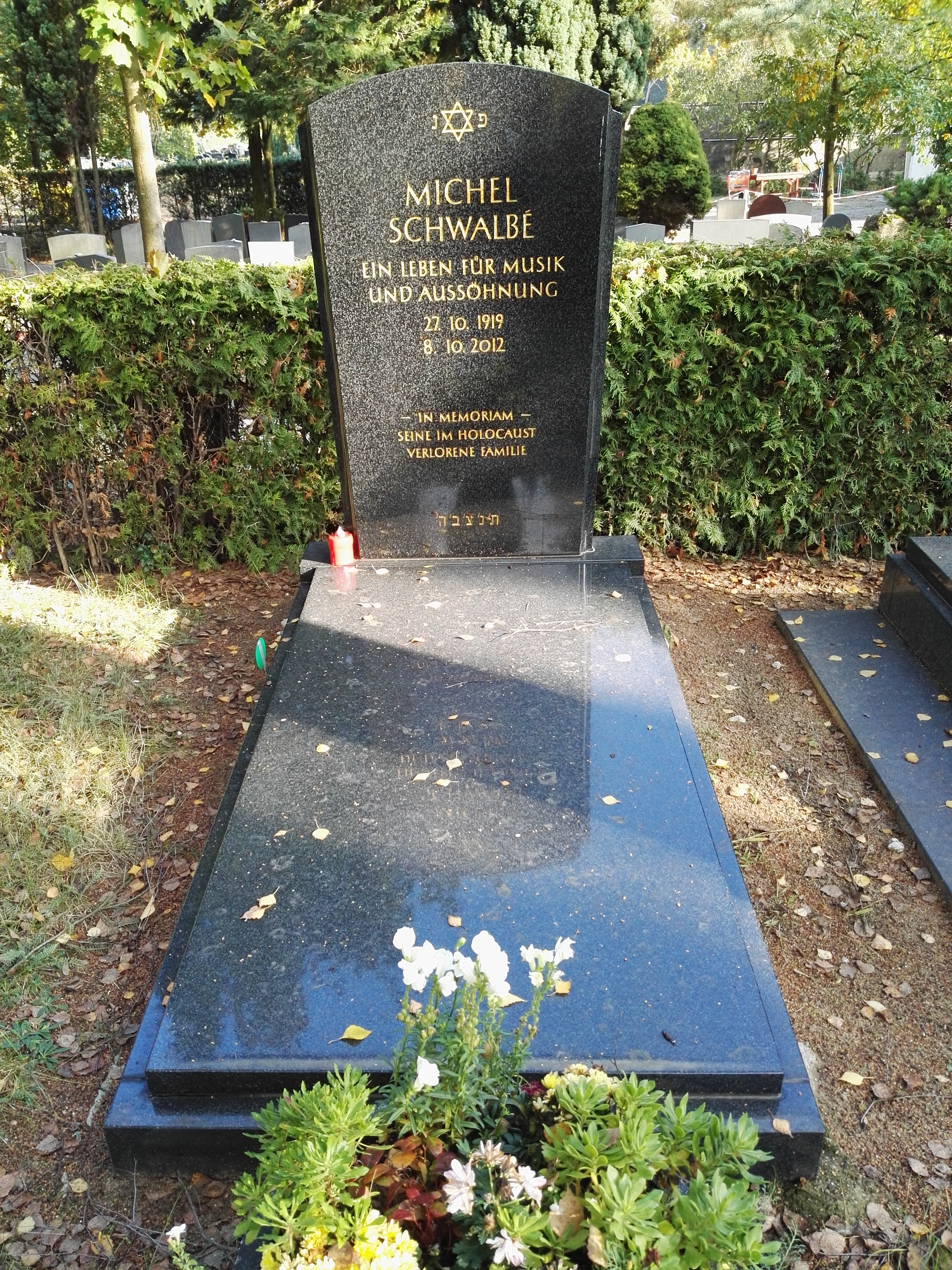 Grab von Michel Schwalbé auf dem Jüdischer Friedhof Heerstraße